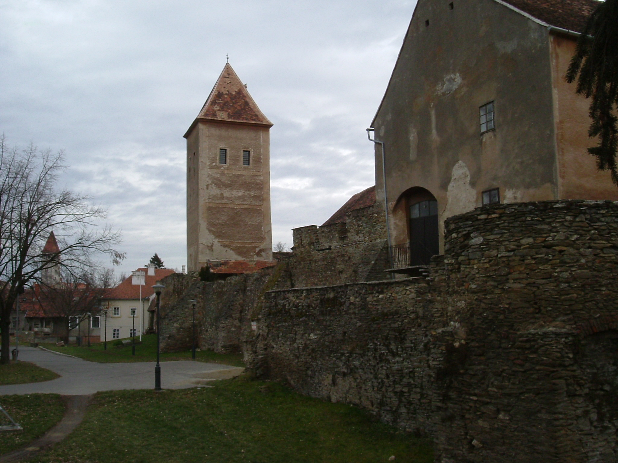 Kőszeg - Hungary, Castle